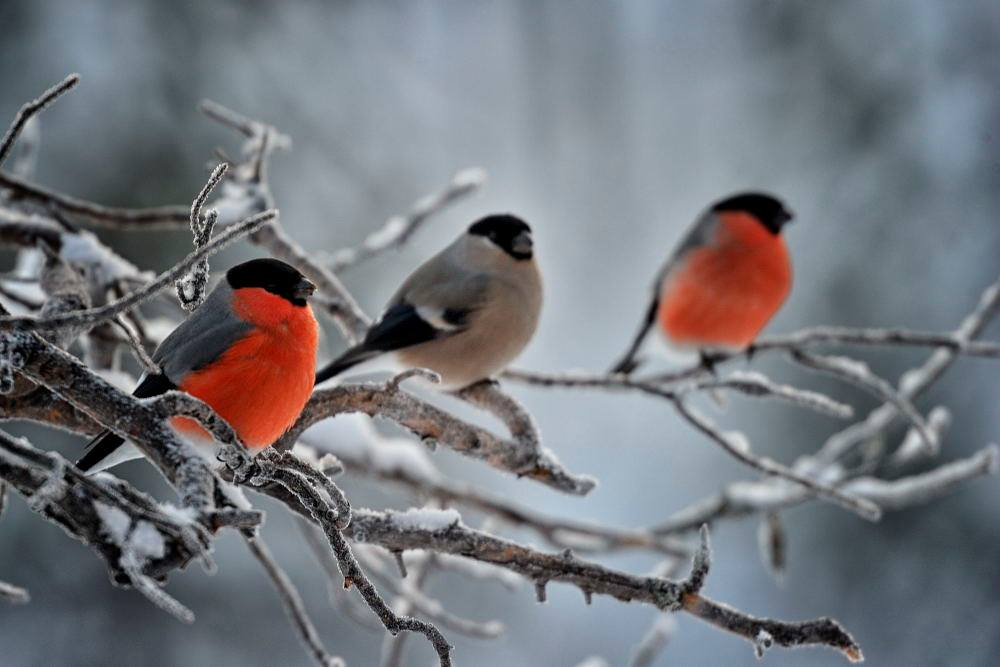 I ciuffolotti , in svedese.- Domherre , sono gli indiscussi principi dell'inverno svedese. la femmina è color tortora , il maschio di un bel rosso ciliegia. Allietano le bianche giornate del lungo inverno.